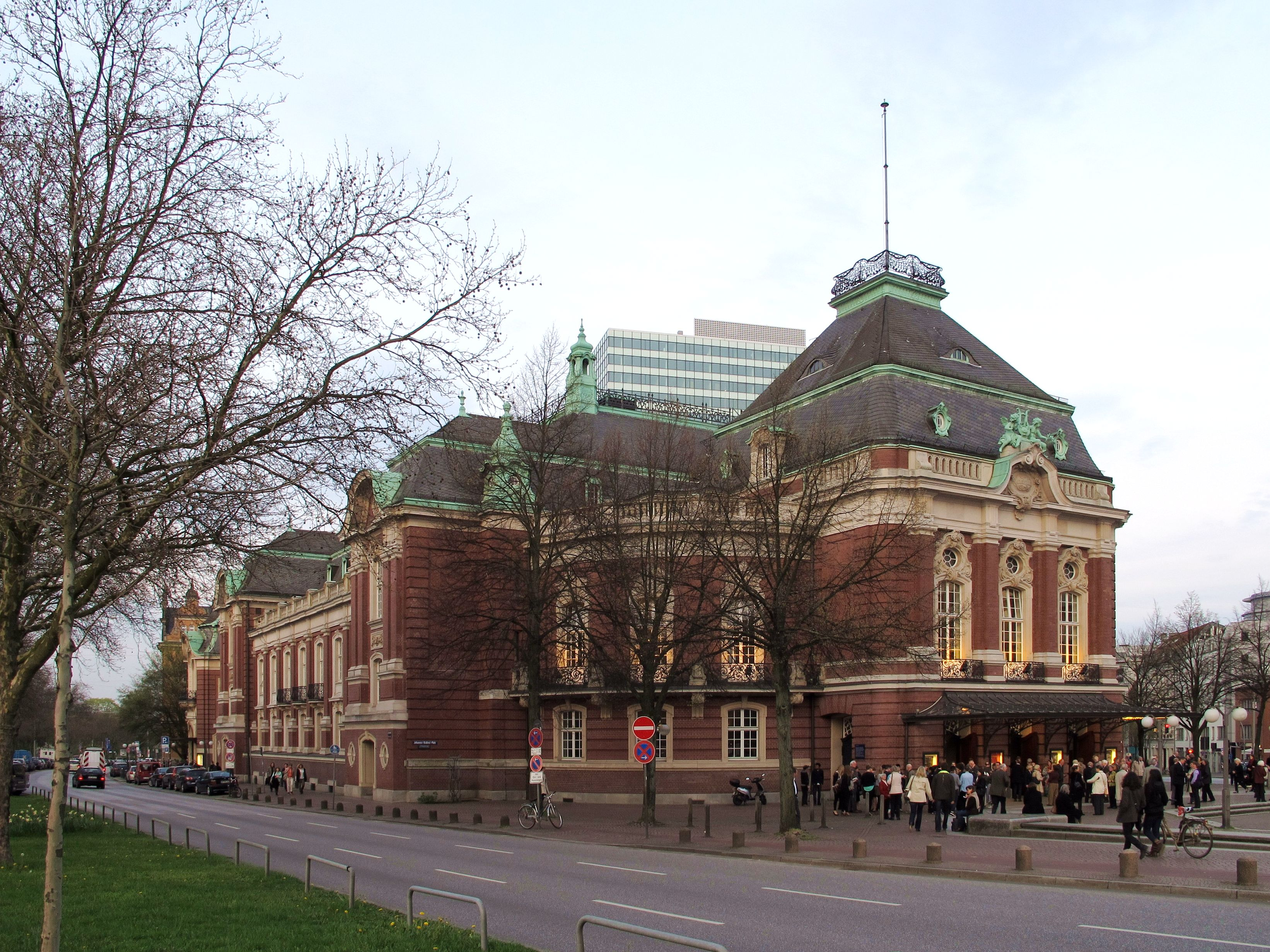 Außenansicht der Laeiszhalle (Musikhalle) in Hamburg